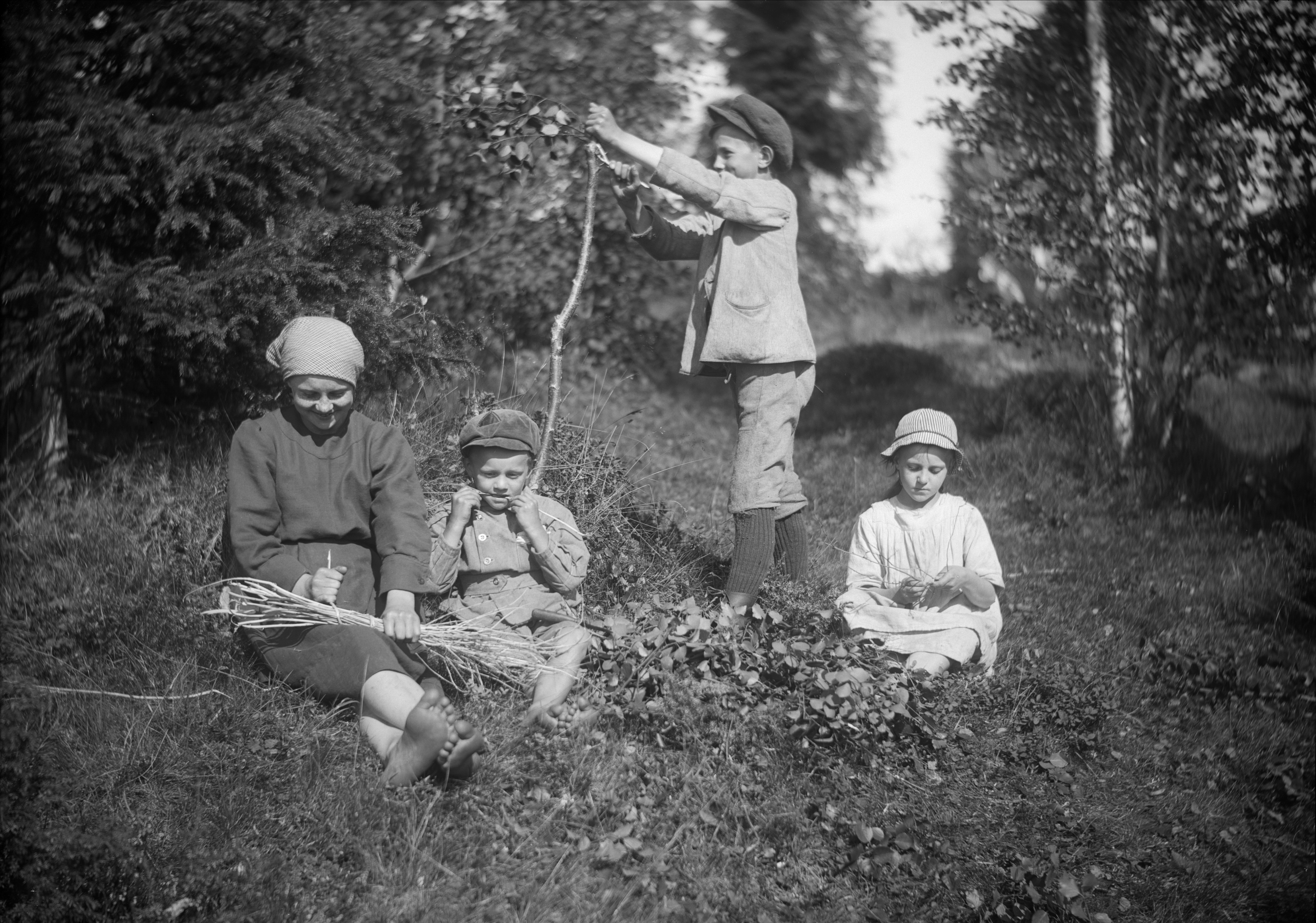 Depicted place: Värmland, Jösse hd, Mangskog (Sverige (SE))